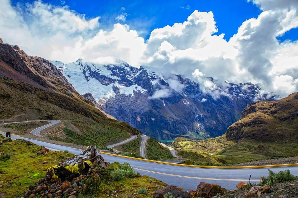 Carretera Carhuaz-Chacas, con vista del nevado Yanarraju y la laguna homónima.